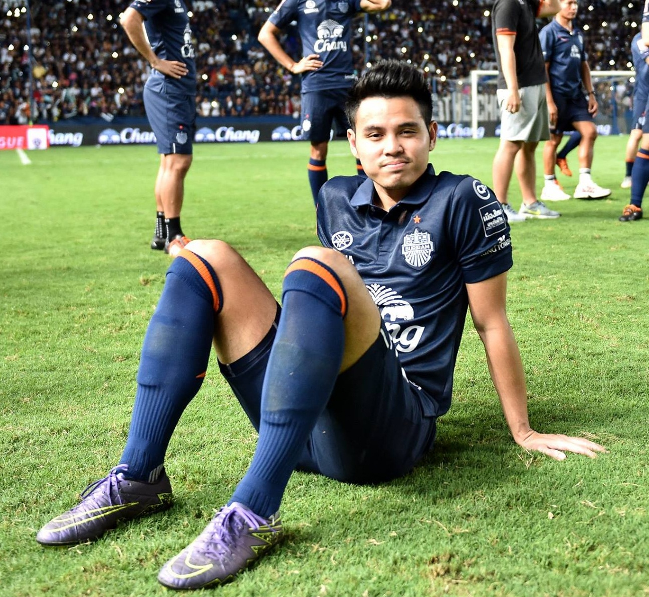 THEE